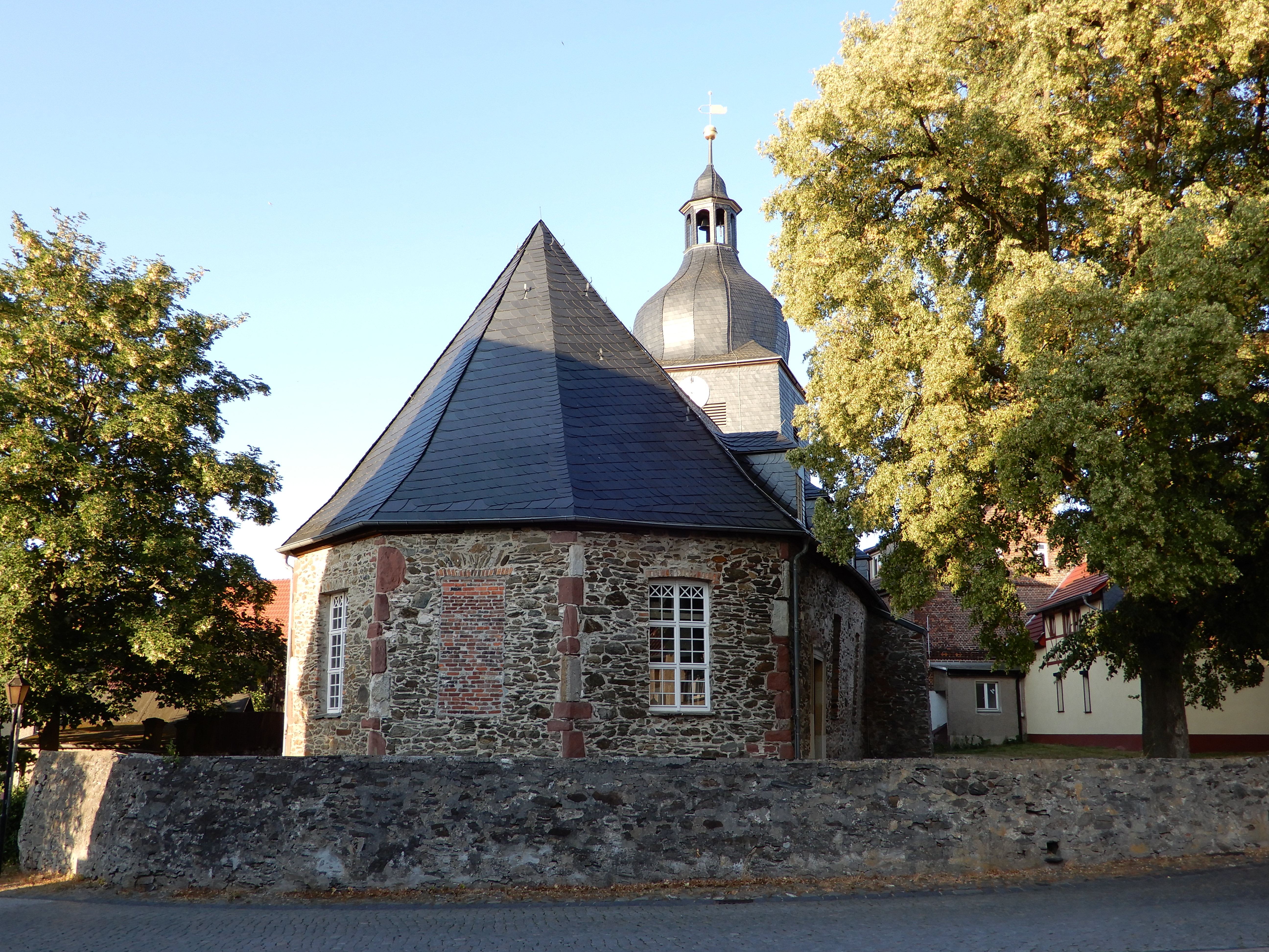 Kirche Unser Lieben Frauen in Dankerode